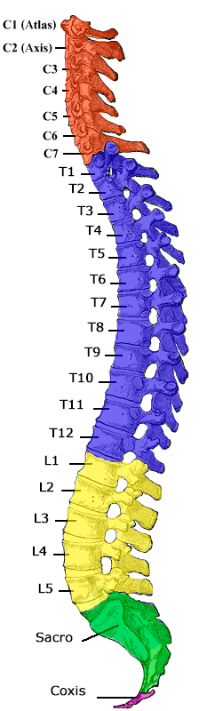 Esquema de la columna vertebral con rótulos en español